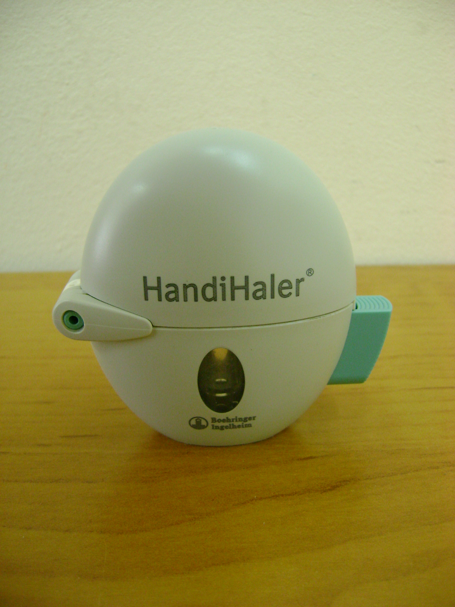 Хендихалер для капсул Спирива